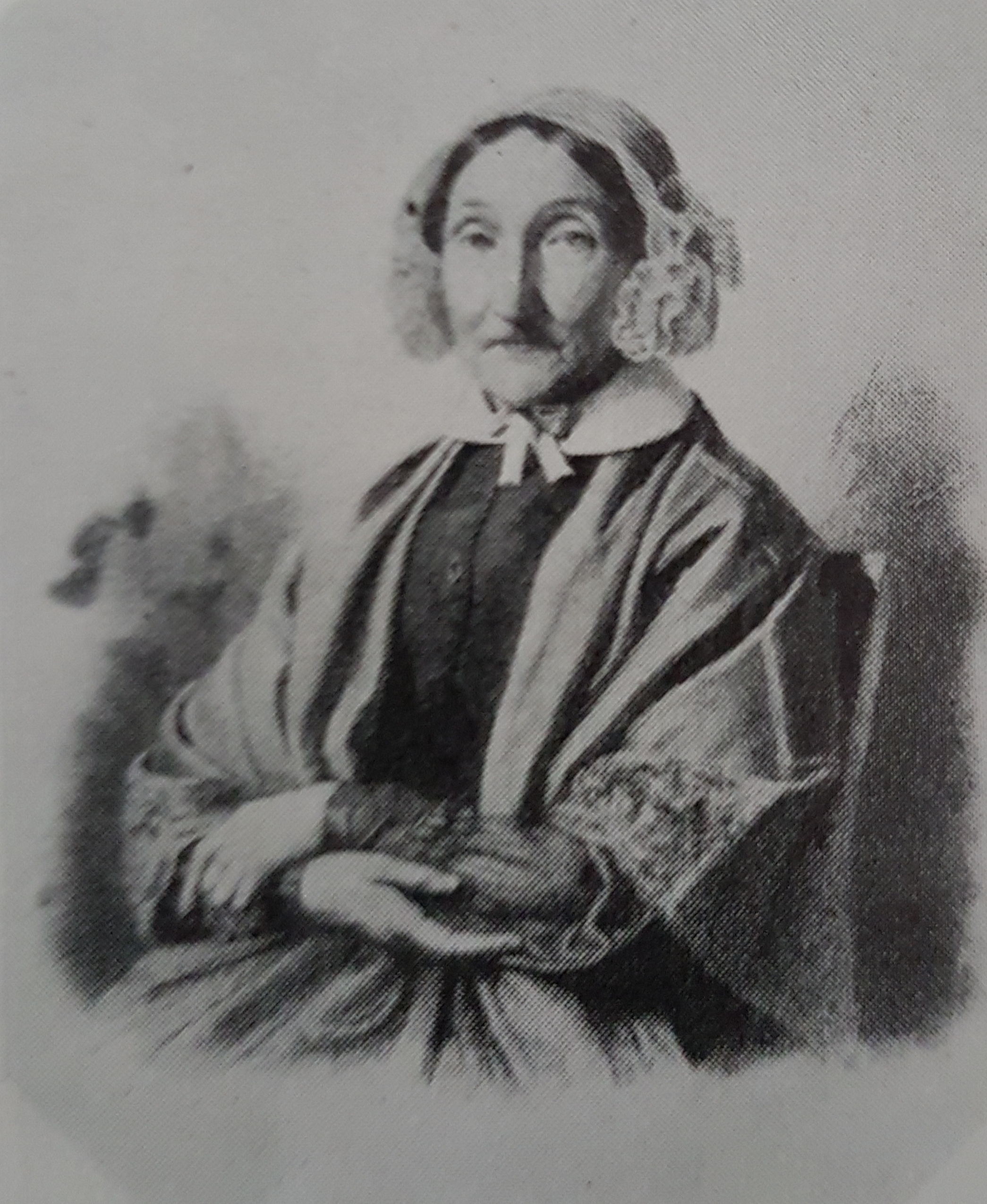 Jeanette Görtz avbildad av Ferdinand Fagerlin, avfotograferad porträttbild från Allhems Svenskt konstnärslexikon.